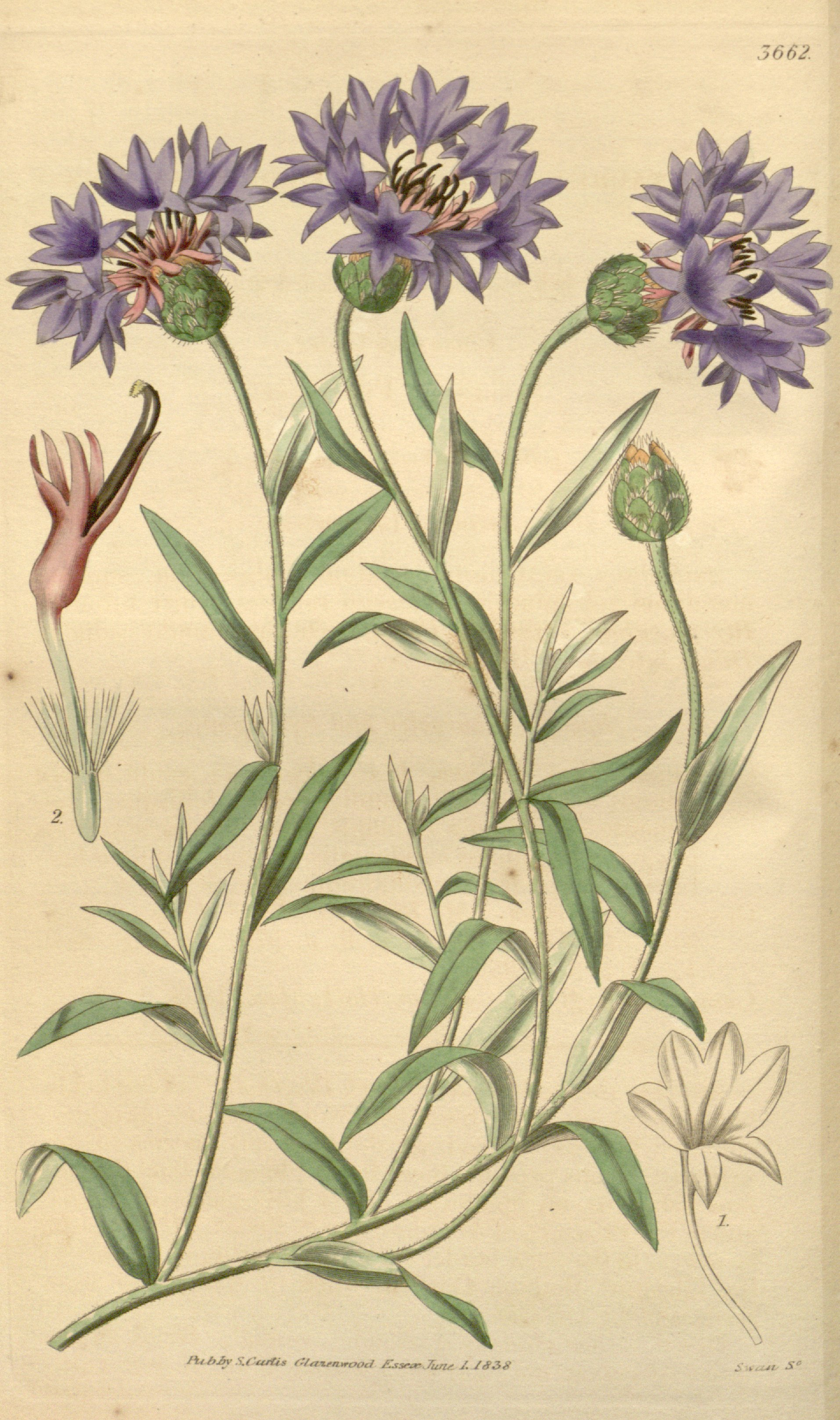 Legende: 1 Äußere Röhrenblüte, Fruchtknoten entfernt. 2 Innere Röhrenblüte.